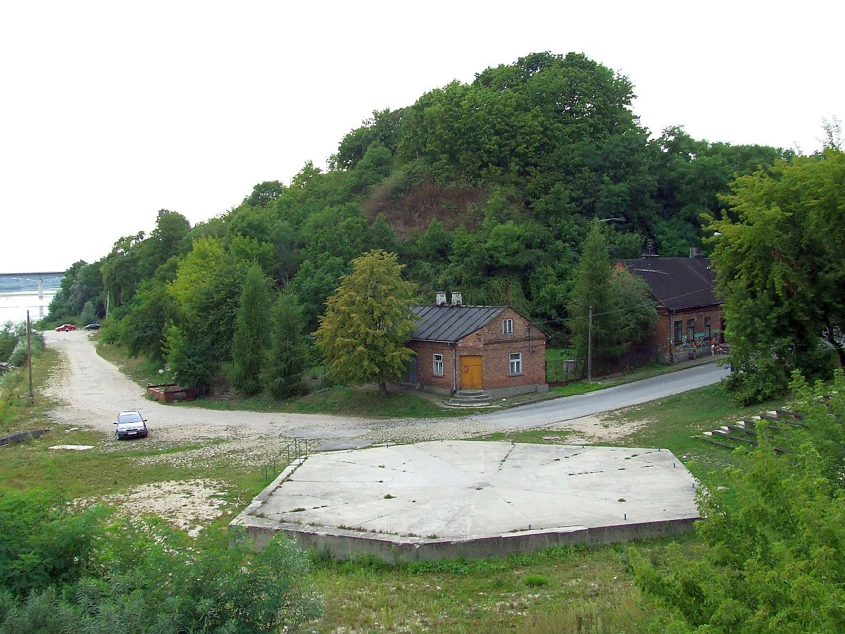 Wyszogród